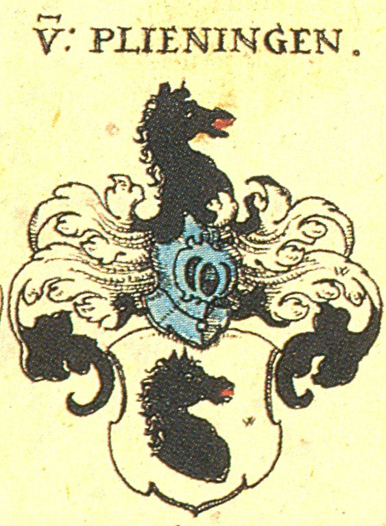 Ritterschaft und Adel in Schwaben von Plieningen